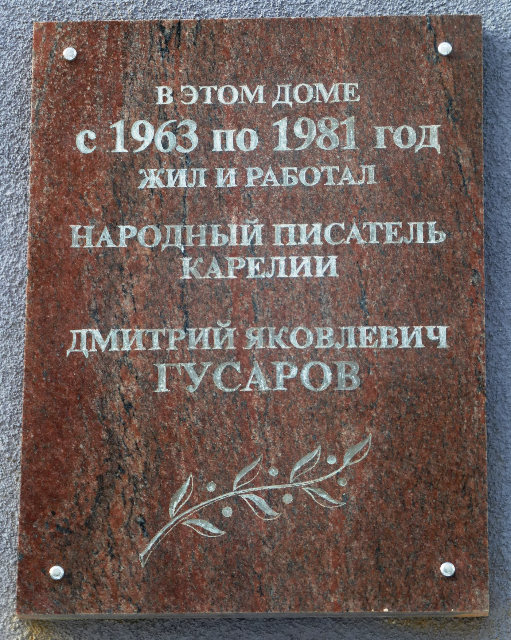 Мемориальная доска Гусарову Д.Я. в Петрозаводске на ул.Свердлова,д.10